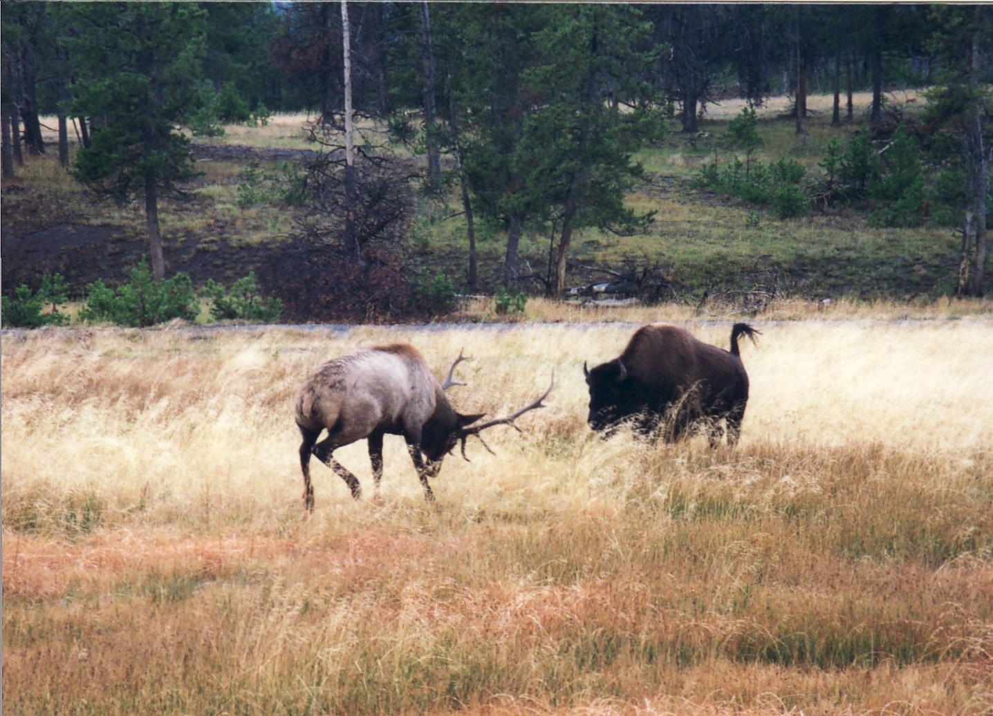 Buffalo charges Elk near old faithful